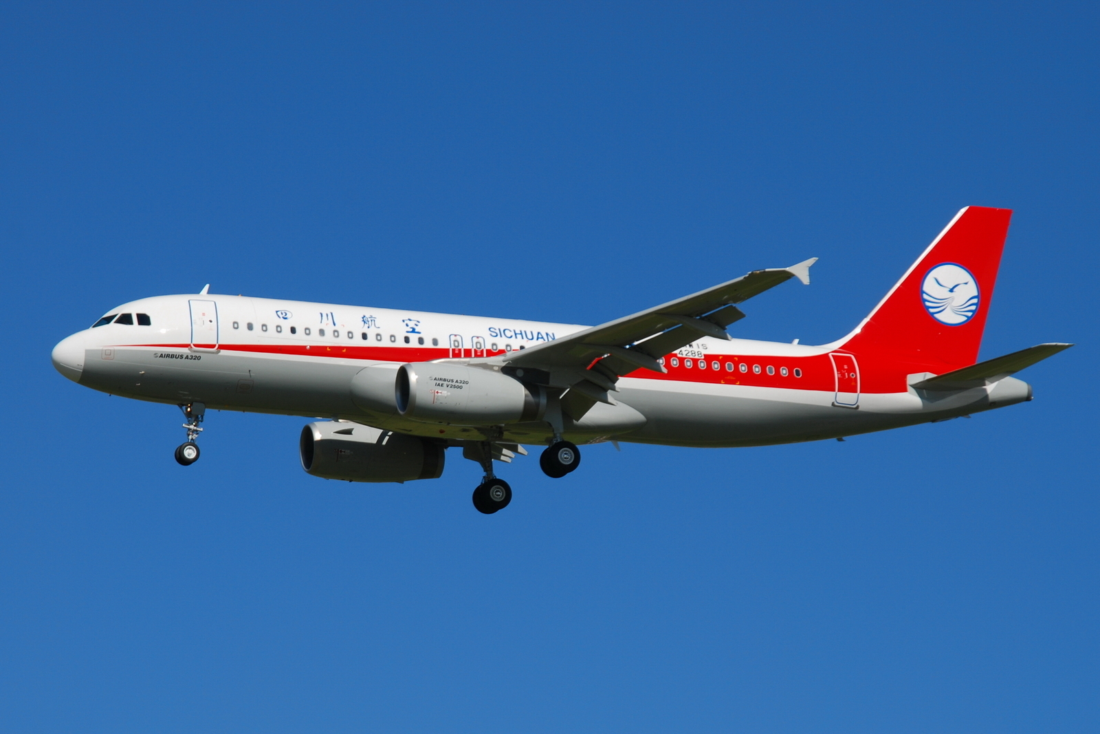 Photo prise à l'aéroport de Toulouse-Blagnac (LFBO) en France. Picture take at Toulouse-Blagnac Airport (LFBO) in France.